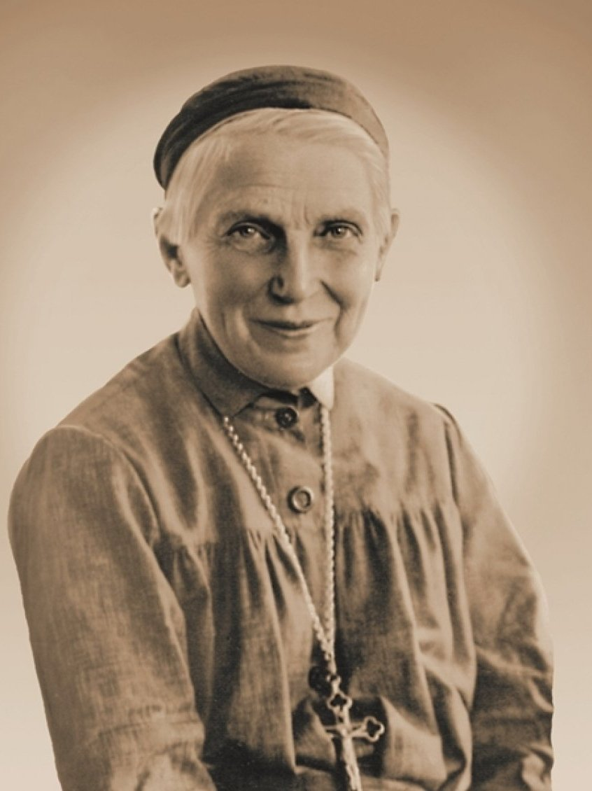 Засновниця Згромадження Сестер Уршулянок Серця Ісуса Конаючого